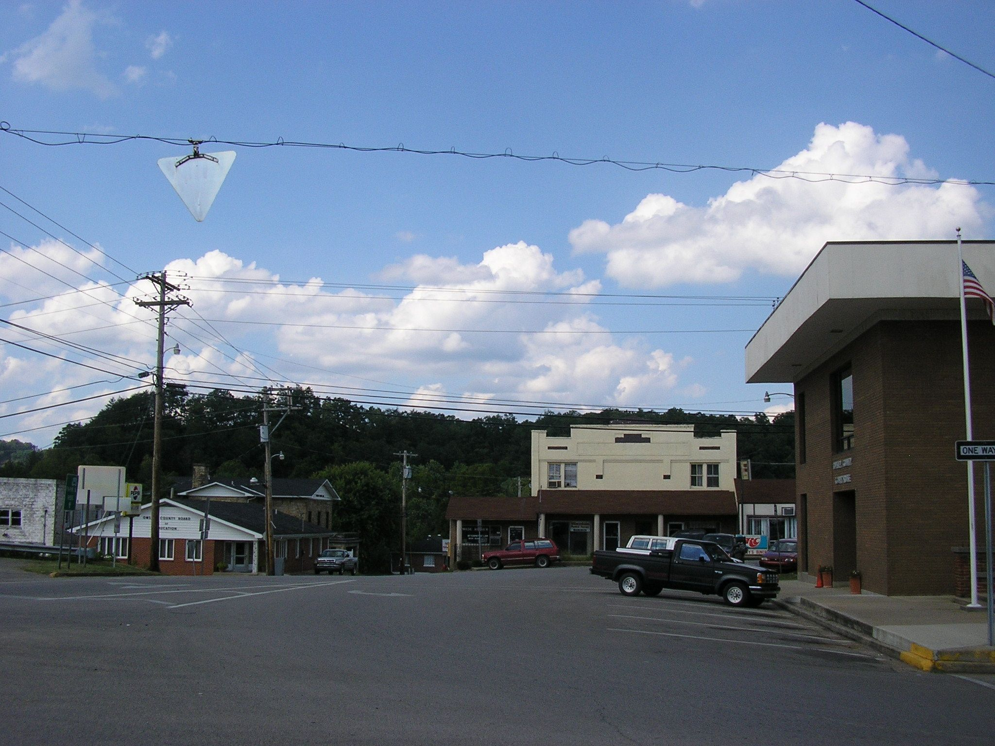 Booneville, KY, USA